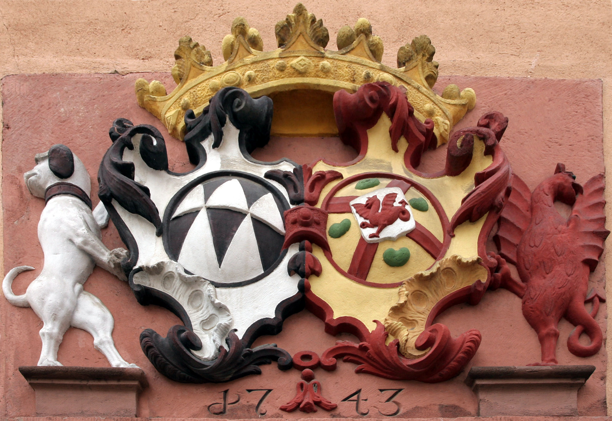 Das Allianzwappen Wambolt/Kesselstadt am Wambolter Hof in Bensheim (Südhessen)